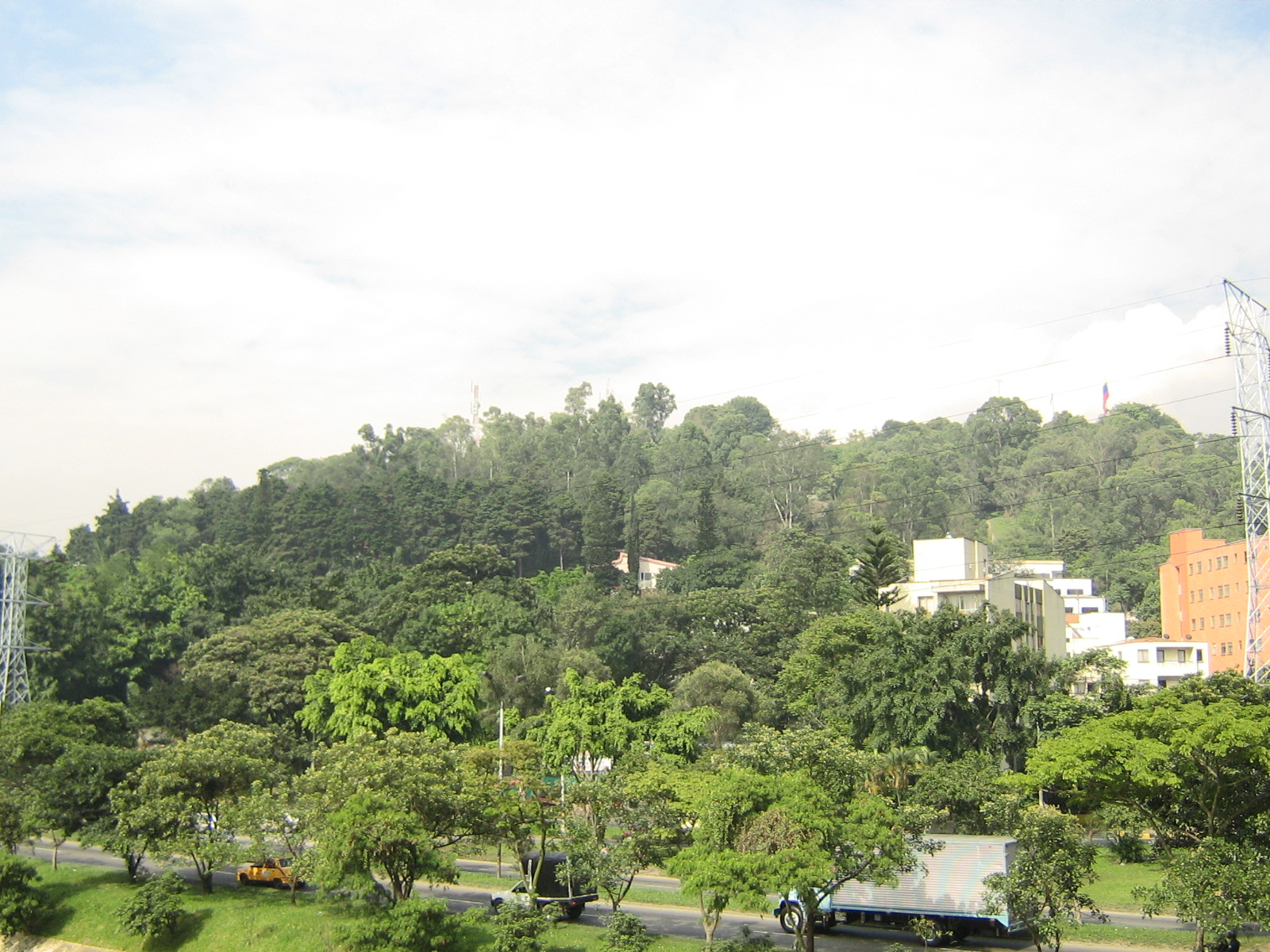 Cerro Nutibara, Medellín (Colombia)